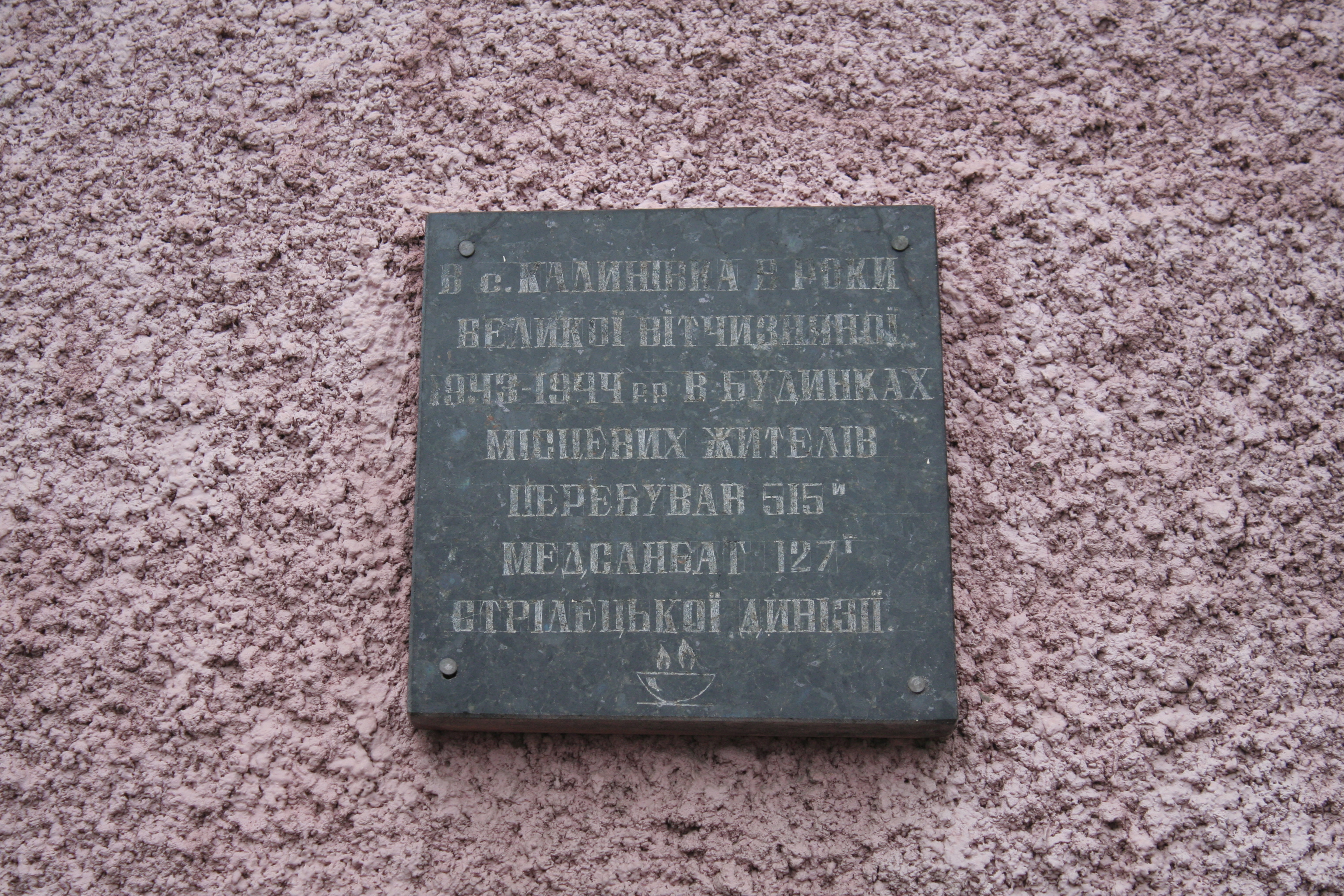 шосе Житомир-Київ, 53 км, с. Калинівка, Поштова станція №3, меморіальна дошка